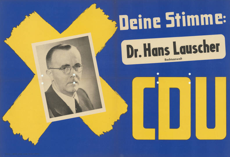 Deine Stimme: Dr. Hans Lauscher Rechtsanwalt CDU Abbildung: Porträtfoto - Stimmkreuz Plakatart: Kandidaten-/Personenplakat mit Porträt Objekt-Signatur: 10-009 : 184 Bestand: Landtagswahlplakate Nordrhein-Westfalen (10-009) GliederungBestand10-18: Landtagswahlplakate Nordrhein-Westfalen (10-009) » Landtagswahl am 18.6.1950 » CDU » mit Porträtfoto Lizenz: KAS/ACDP 10-009 : 184 CC-BY-SA 3.0 DE